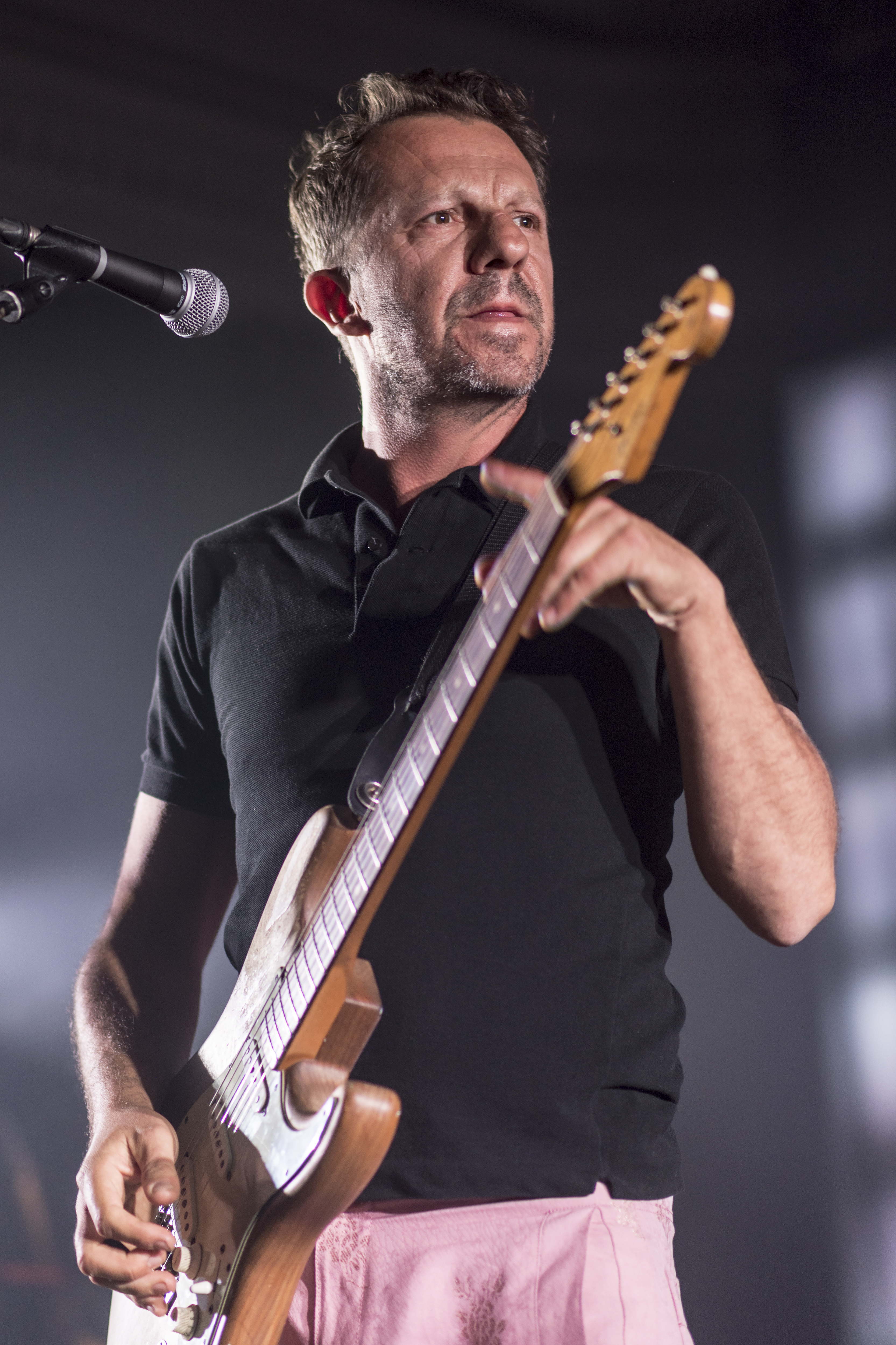 Tom Barman in 2019